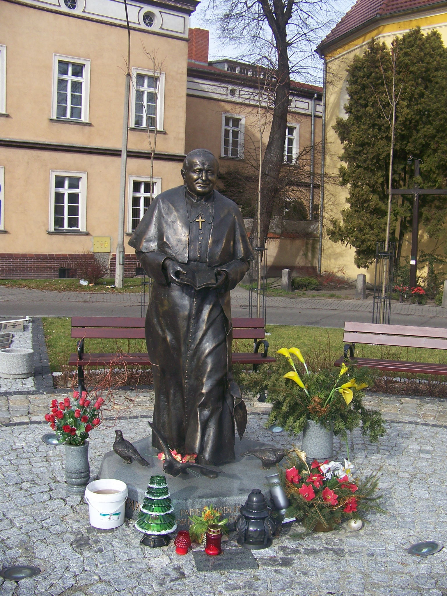 Pomnik Jana Pawła II w Kościanie; Monument of John Paul II in Kościan, Poland